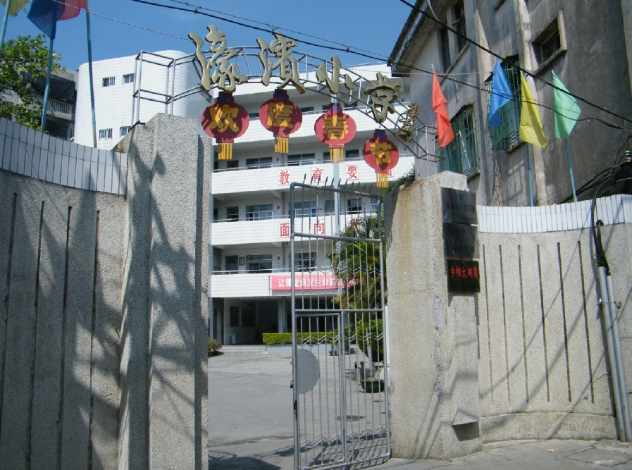 永德路濠滨小学，原达濠镇二小学。